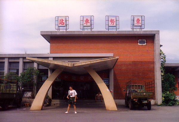 中文（台灣）: 臺灣鐵路管理局東勢線停駛前拍攝的東勢車站。因為遊客眾多，不容易拍到前景沒有人的相片。